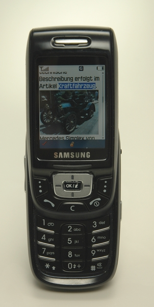 Samsung D500